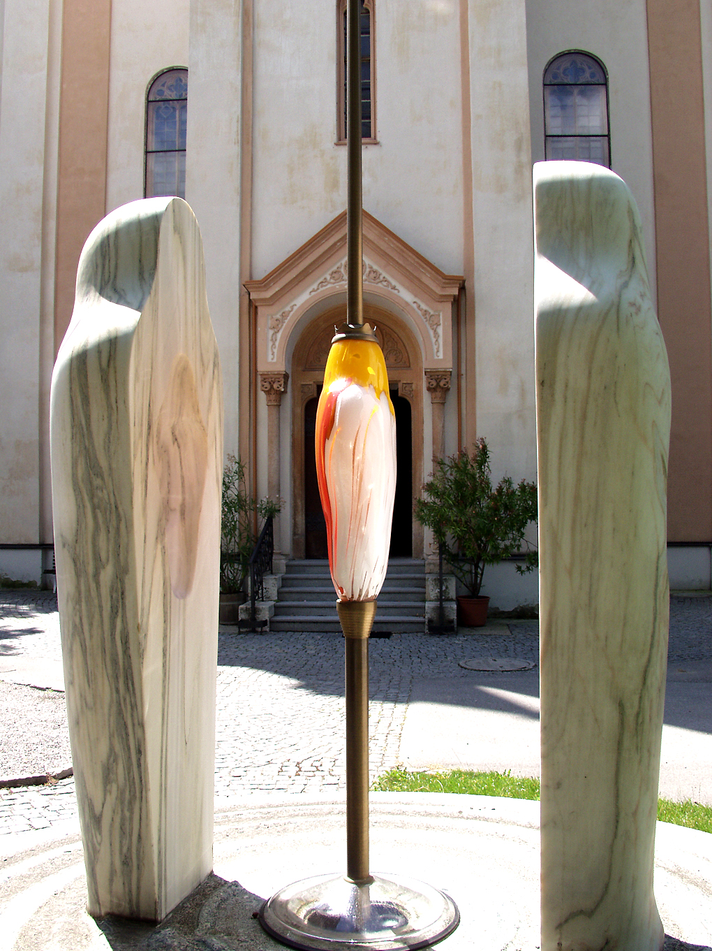 Kath. Pfarrkirche hl. Leonhard